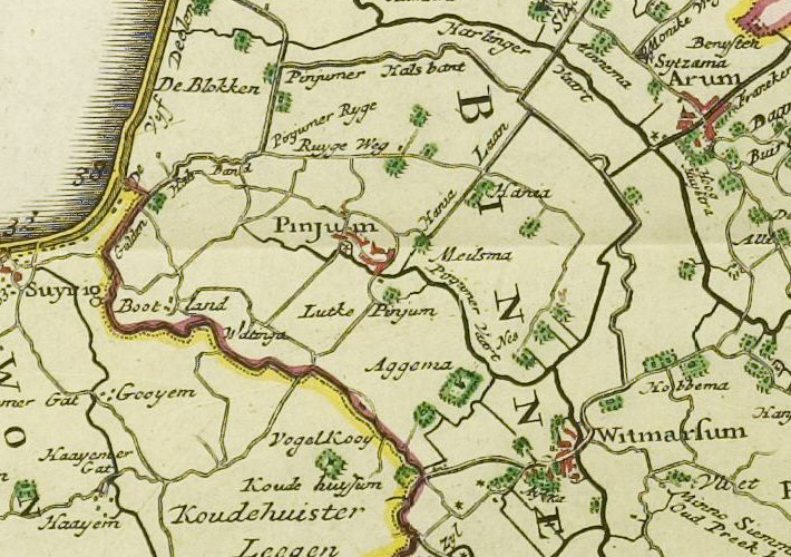 Pingjum met omringende dijk, de Pingjumer Gulden Halsband of Pingjumer Halsband (detail van de kaart van Westergo)